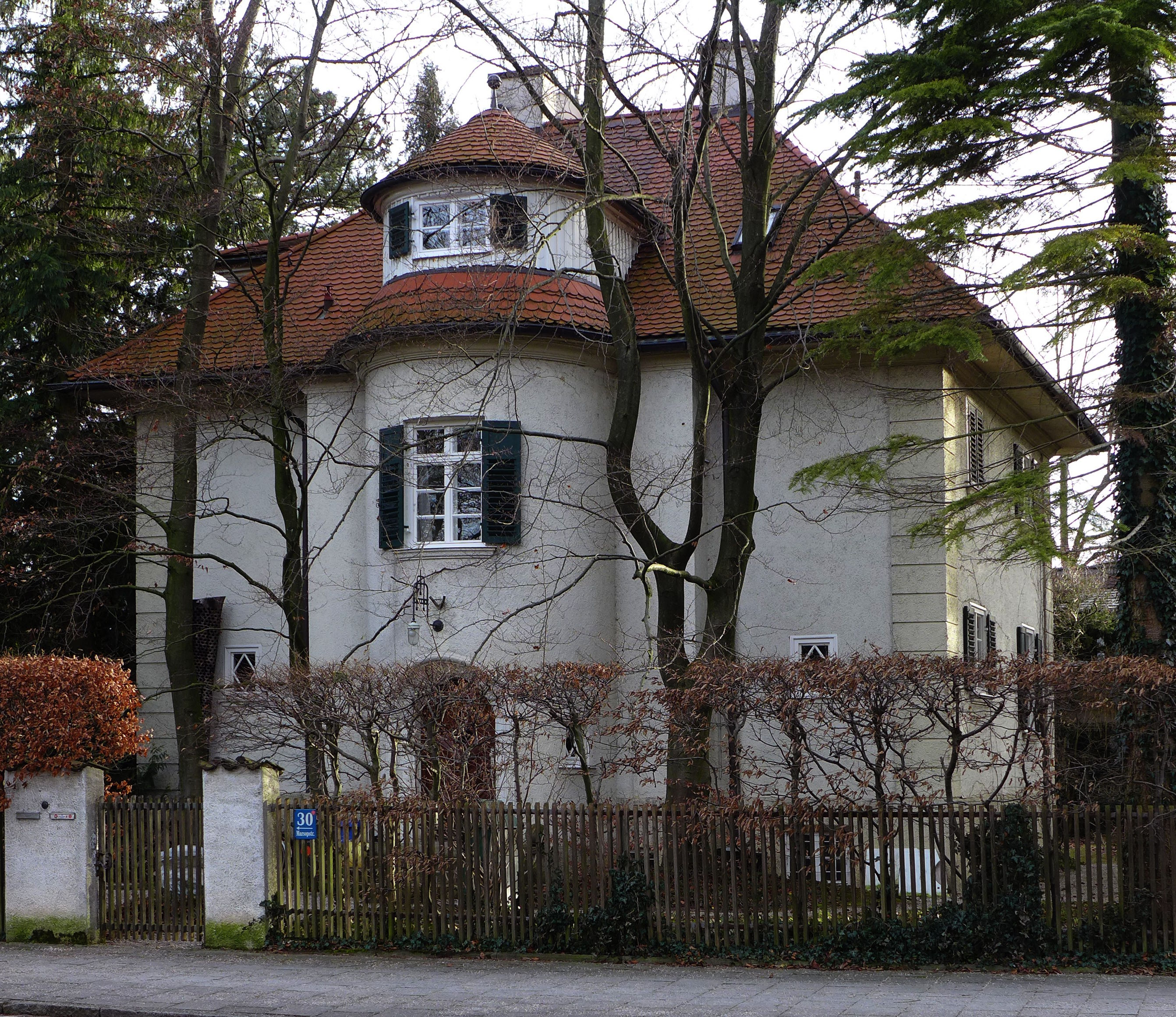 Marsopstr 30, München